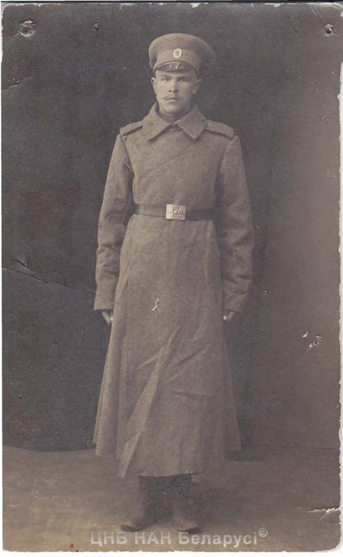 Кандрат Крапіва-салдат царскай арміi. 1915 год.